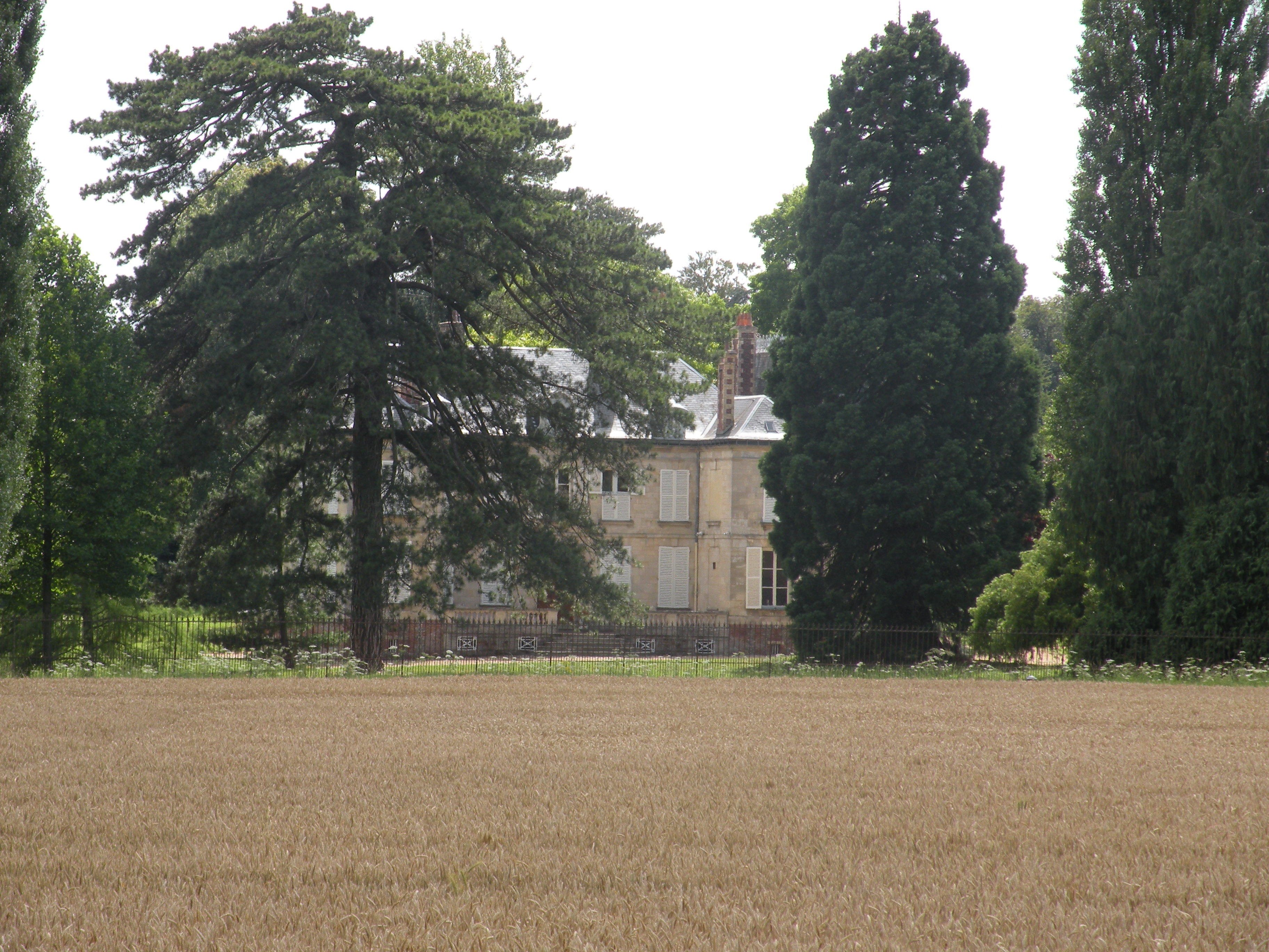 chateau de Pouilly (Oise)